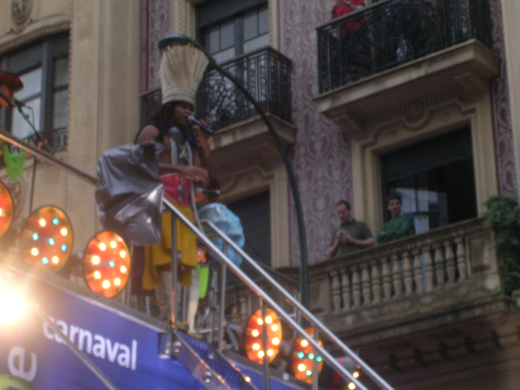 carlinhos a bilbao nel marzo 2005